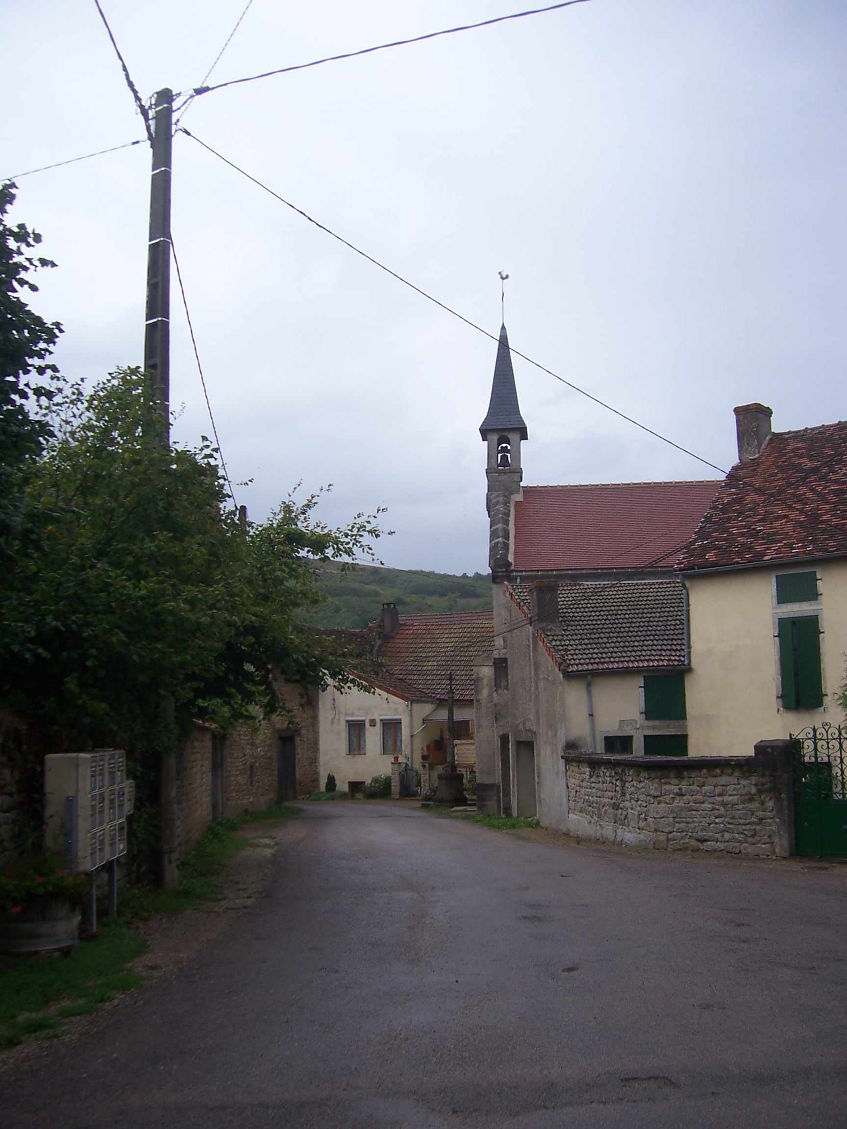 Eglise de Créot